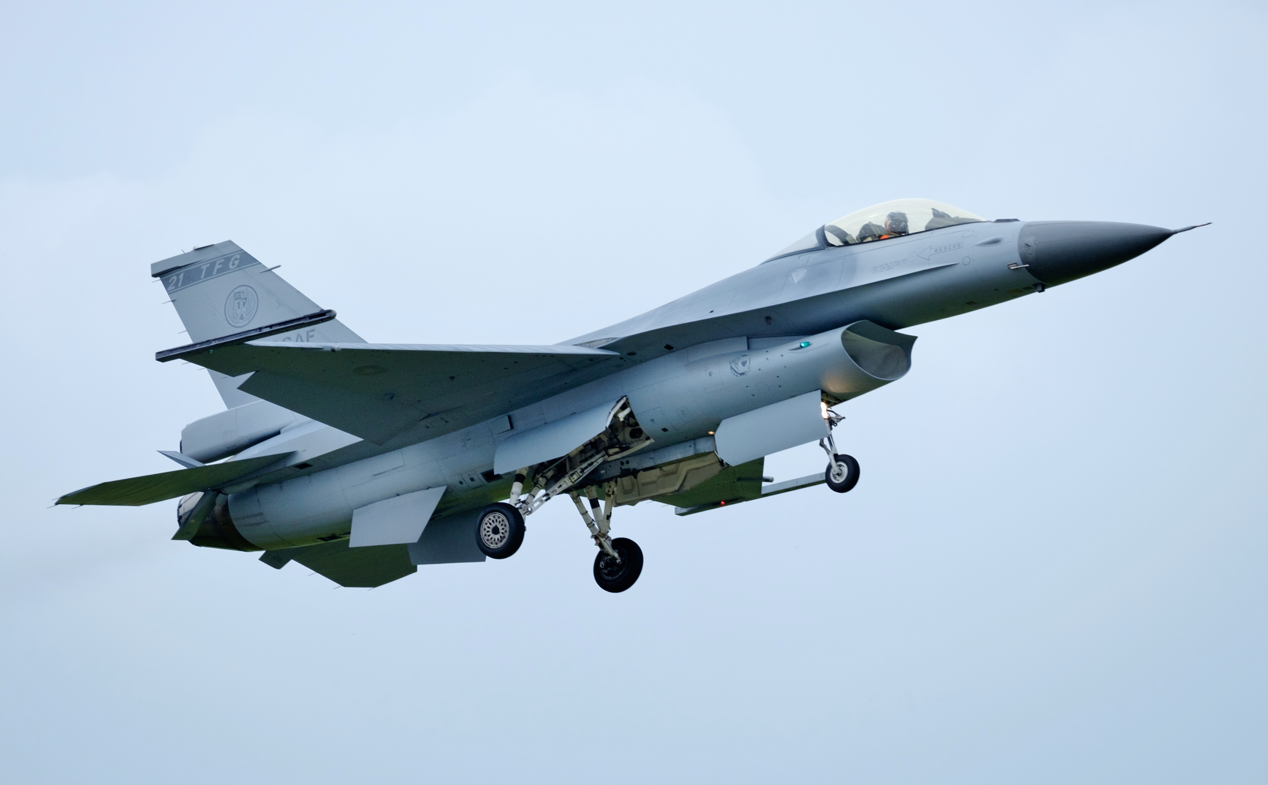 2016年空軍清泉崗基地營區開放活動上午，戰技操演低空通過會場的455聯隊F-16A 6623，由林育生中校操縱。